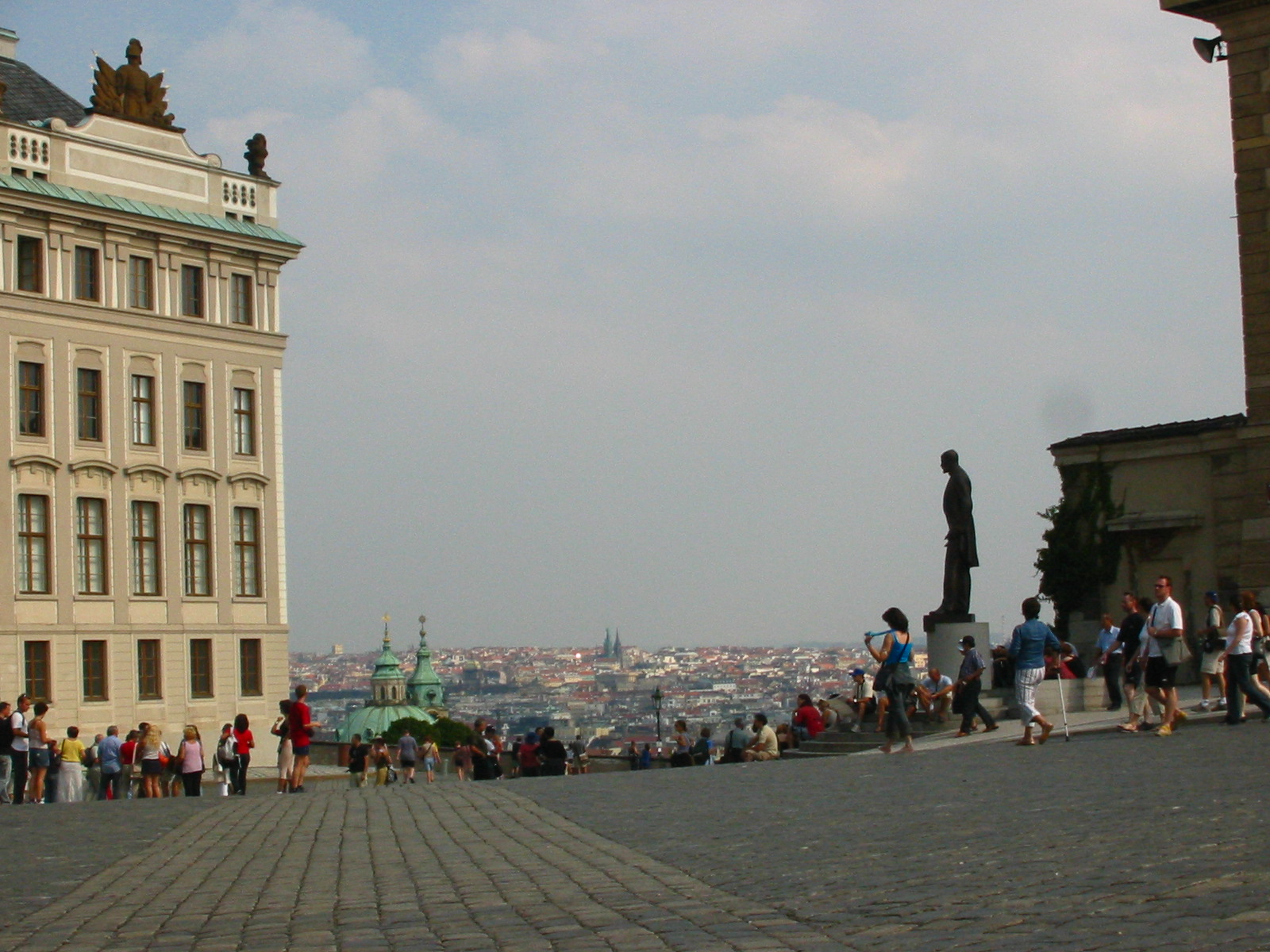 Blick von der Hradschin auf Prag (August 2003). Im Vordergrund die Statue von Tomáš Garrigue Masaryk